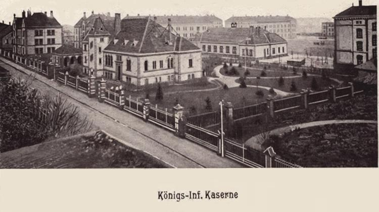 Kaserne des Königs-Inf.-Rgt Nr. 145 in Metz (Caserne Raffenel á Metz)